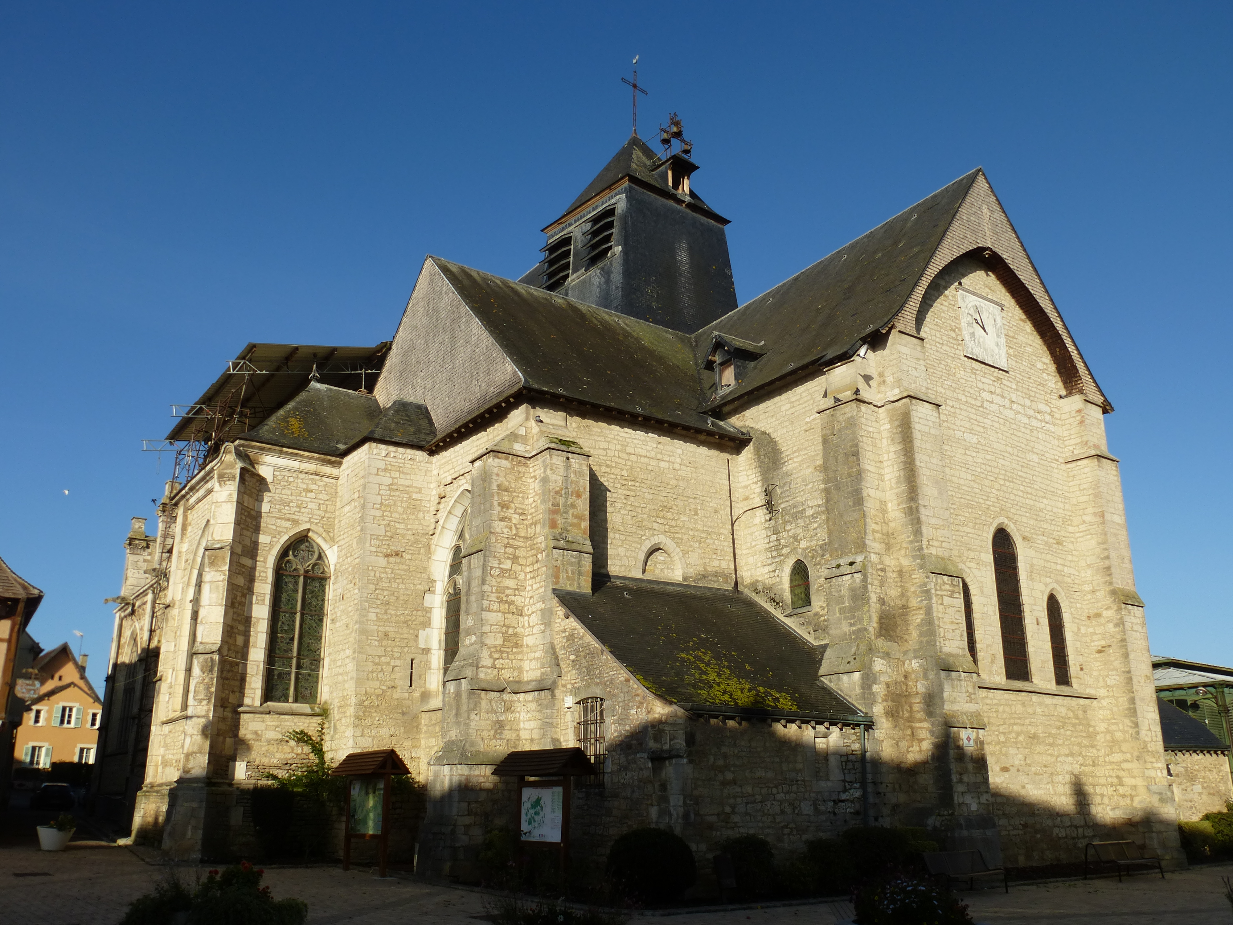 Eglise de Praslin 16-18eme siècle